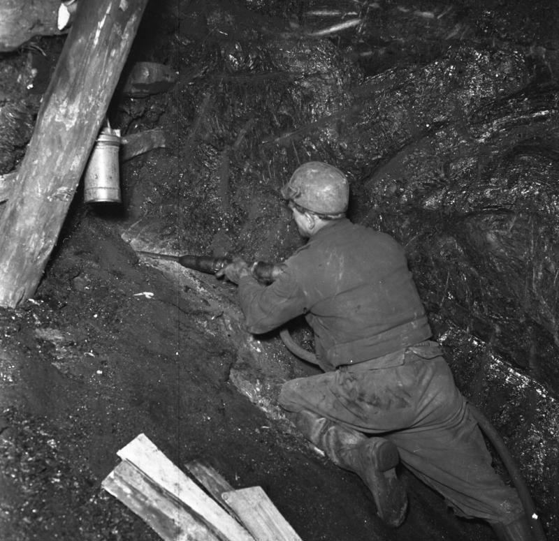 Ruhrbergbau